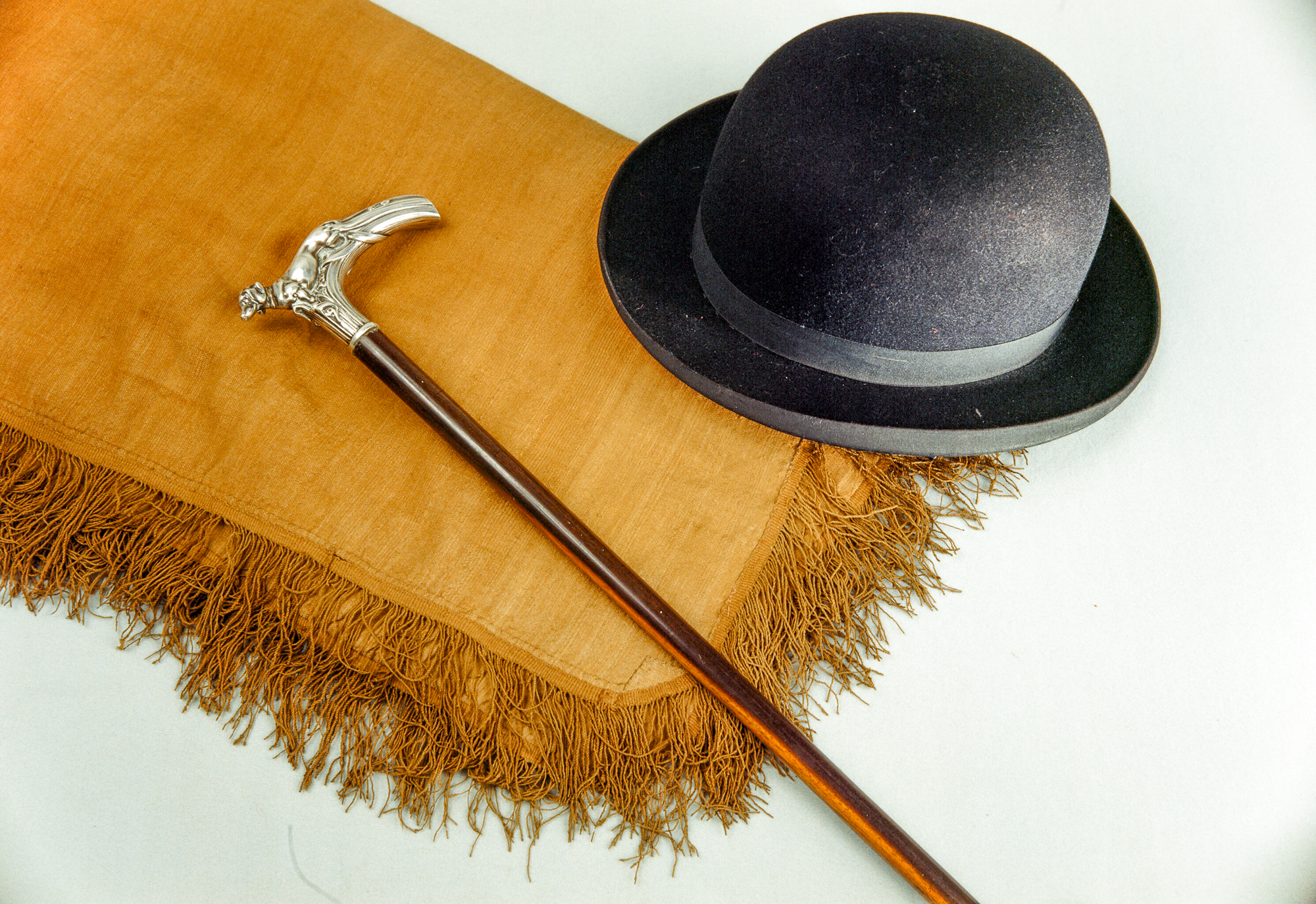 Pertenencias personales del Presidente Hipólito Yrigoyen.